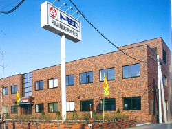 福山醸造本社